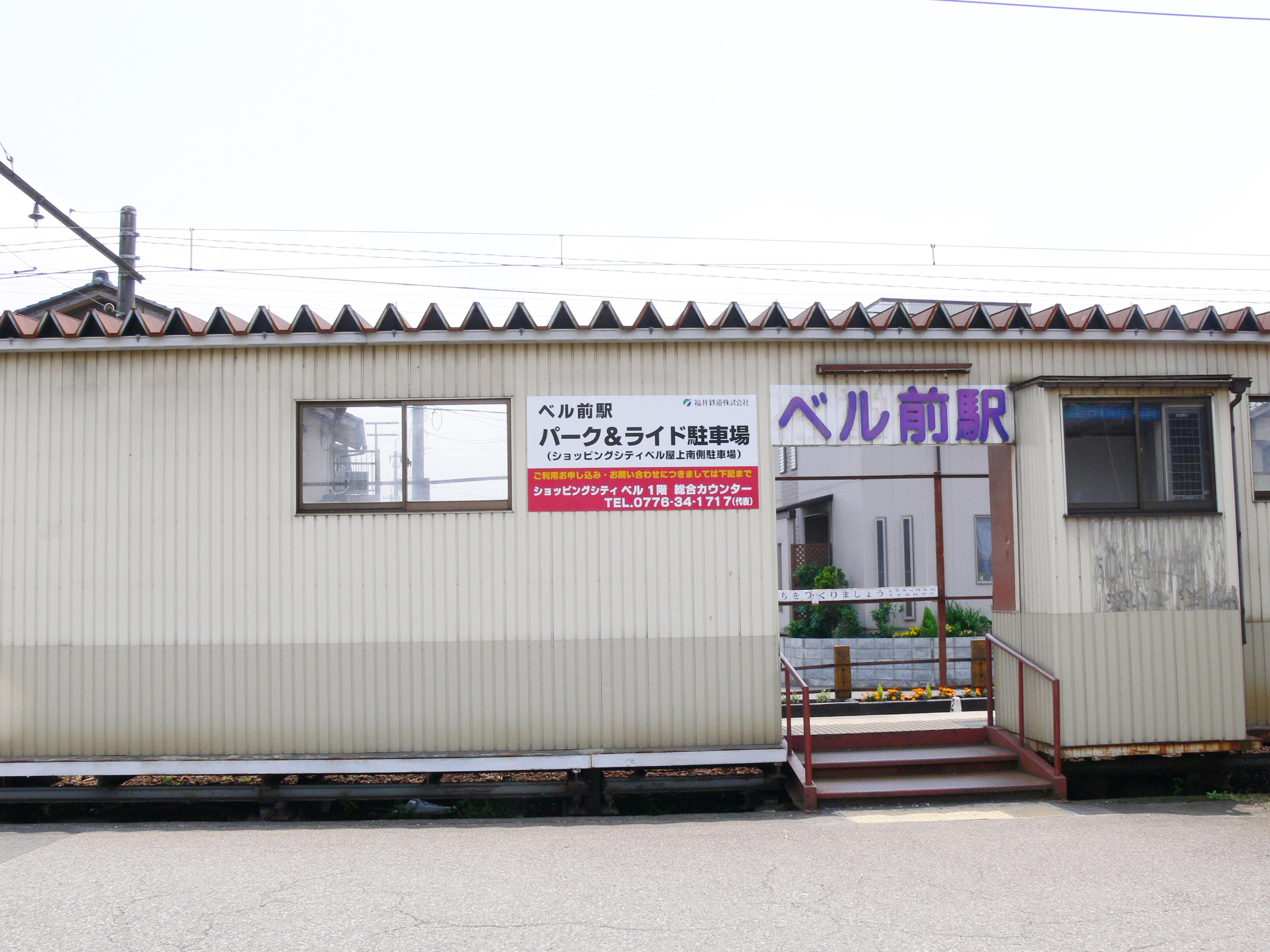 Bell-mae Station